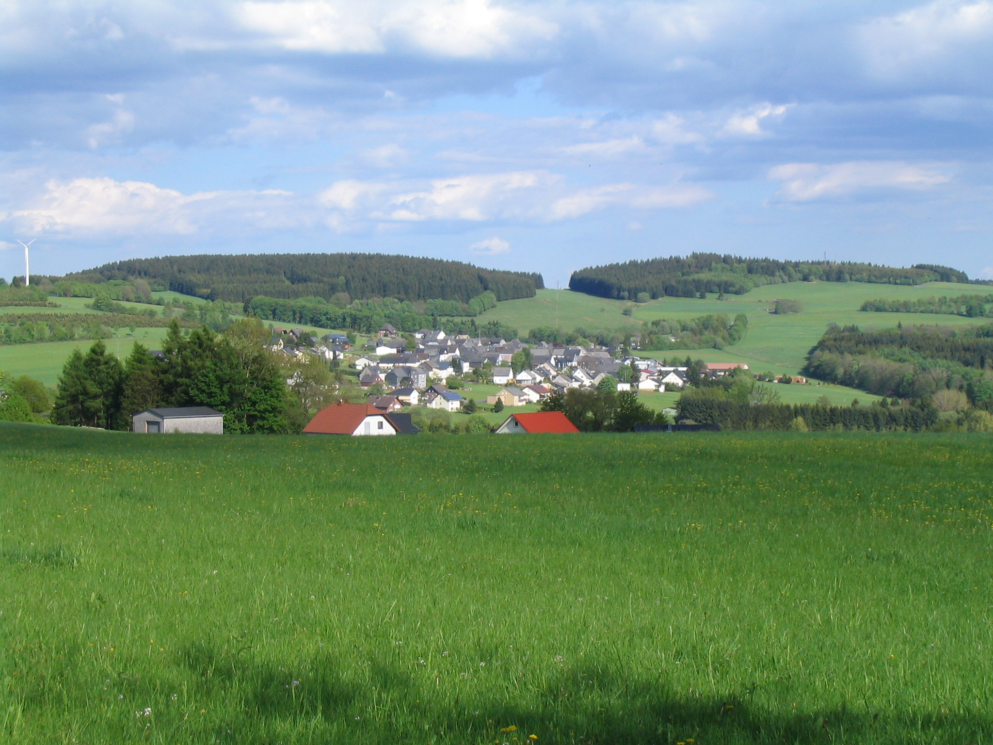 Blick zur Fuchskaute (657 m) - höchster Berg im Westerwald von Westen. Im Vordergrund Häuser von Bretthausen, dahinter der Ort Willingen